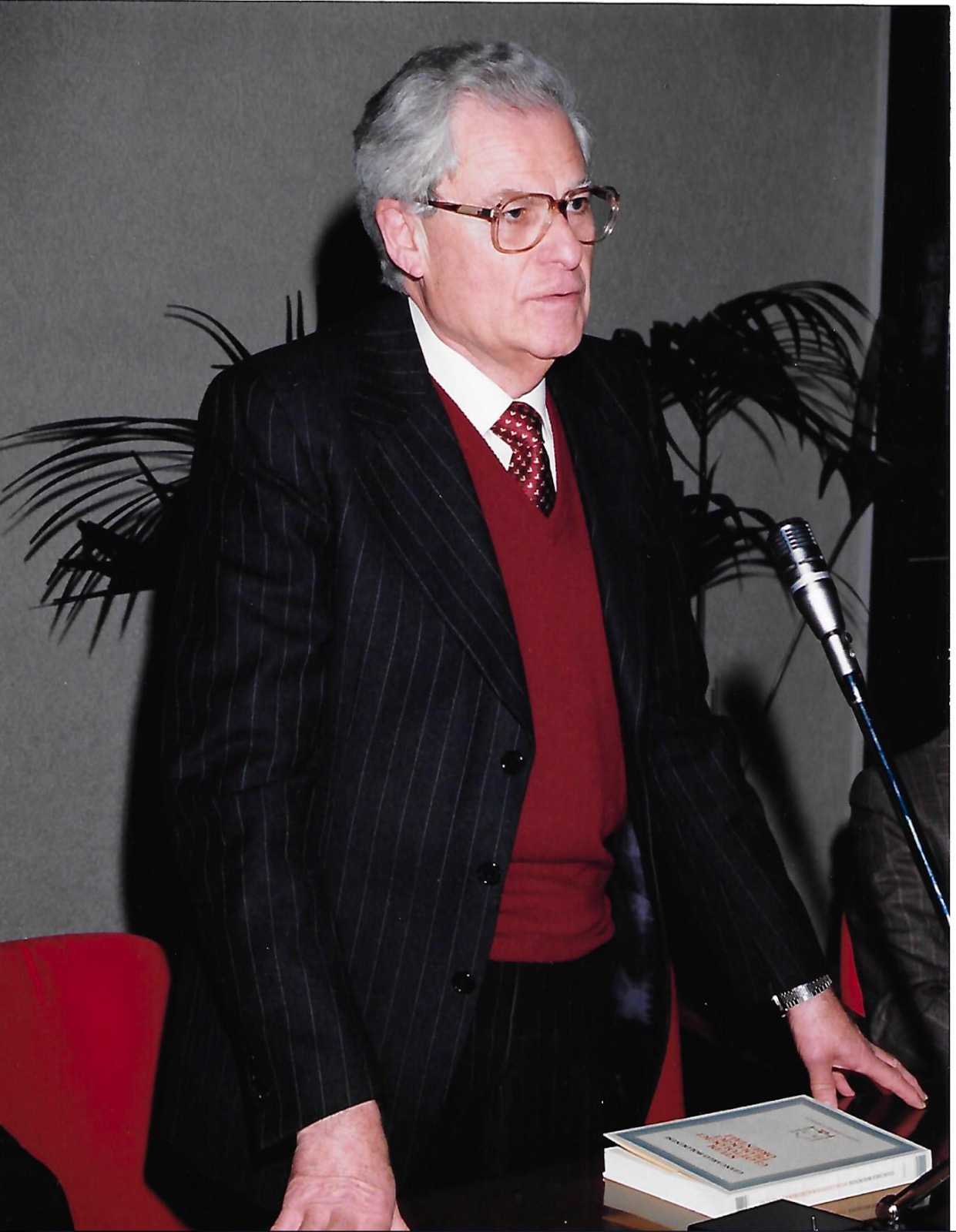 Tarditi ritratto durante la presentazione in Università Cattolica di un volume, pubblicato nel 1990, del linguista Giancarlo Bolognesi.